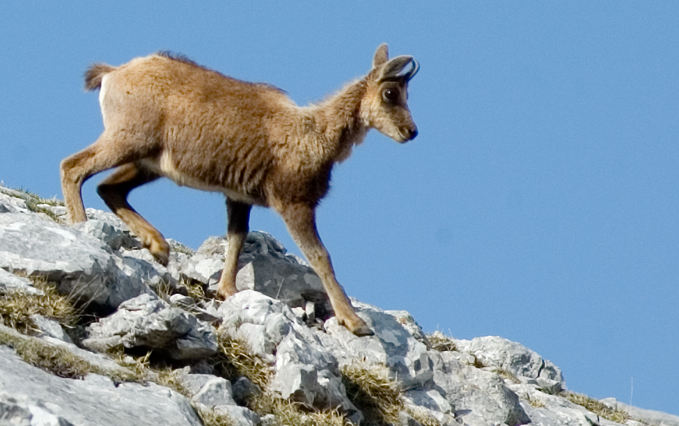 Cría de rebeco en el Parque Nacional de los Picos de Europa. Cantabria (España).